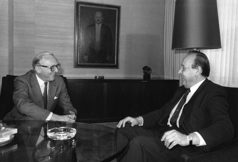 Bonn, 2. Juli 1984 Kurz nach seinem Amtsantritt stattete der neue NATO-Generalsekretär, Lord Peter Alexander Carrington, der Bundesregierung seinen Antrittsbesuch ab. Nach Gesprächen mit Bundesaußenminister Genscher und Bundeskanzler Kohl wurde der NATO-Generalsekretär auch von Bundespräsident Dr. Richard von Weizsäcker empfangen. Bundesaußenminister Genscher (rechts) im Gespräch mit NATO-Generalsekretär Lord Carrington im Auswärtigen Amt.